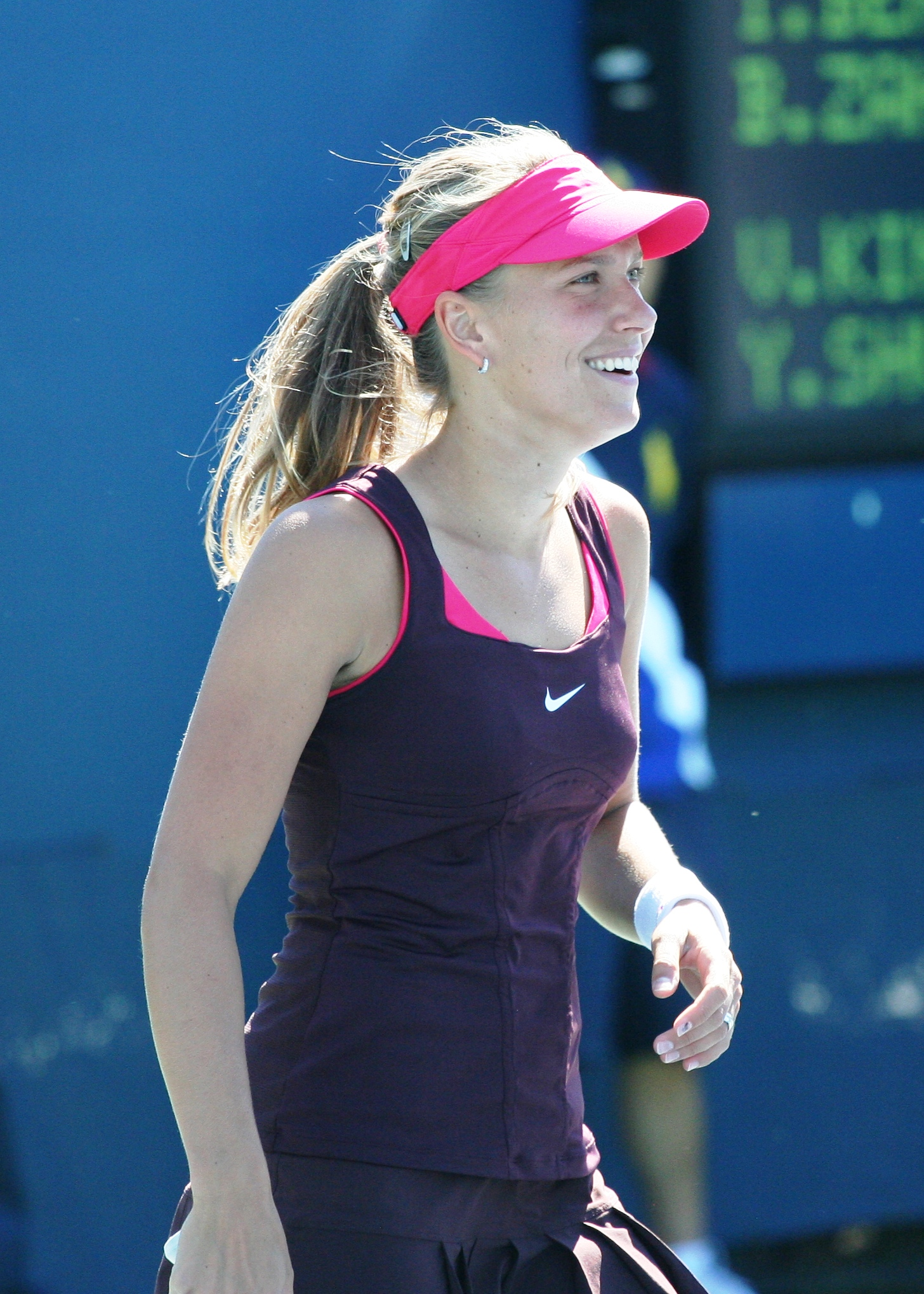 U.S. Open Sunday, Sept. 5, 2010